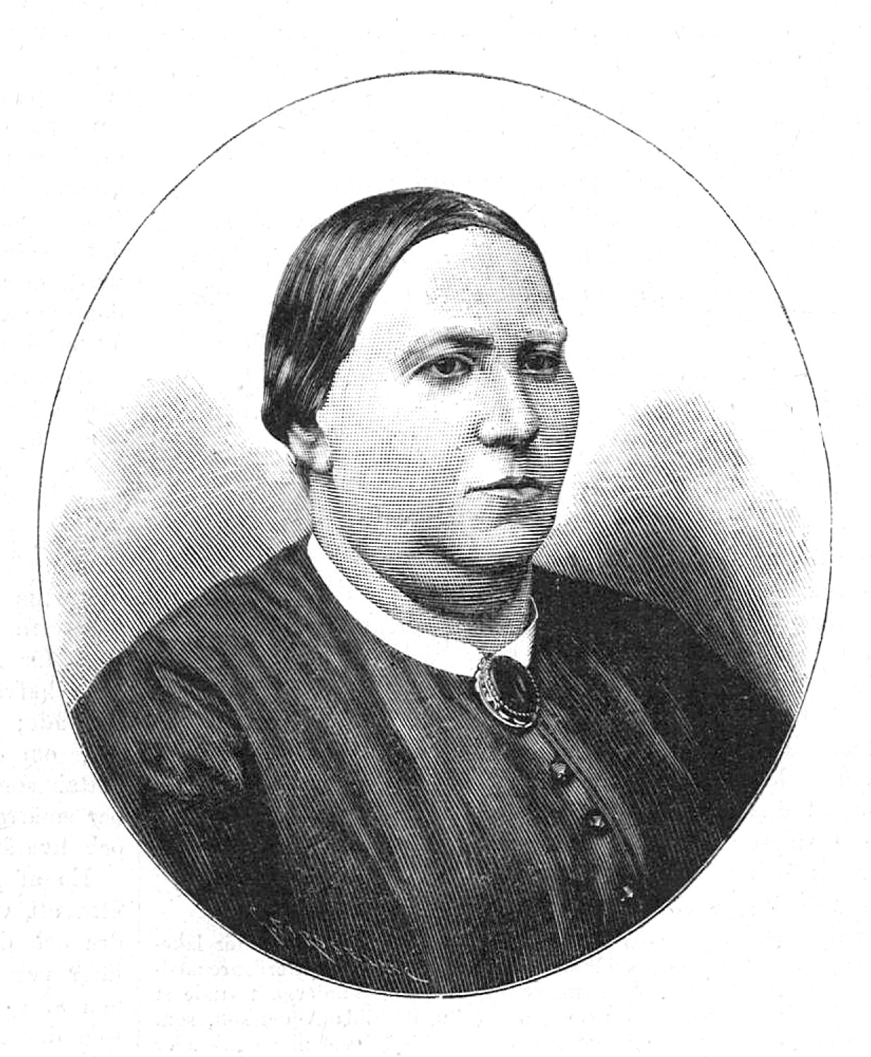 Elna Hansson (1814-1891)